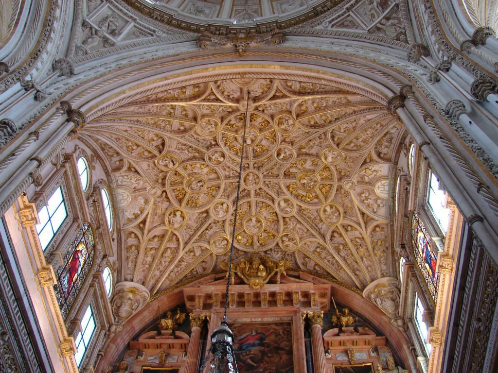 Kuppel der Kirche in der Mezquita, Cordoba